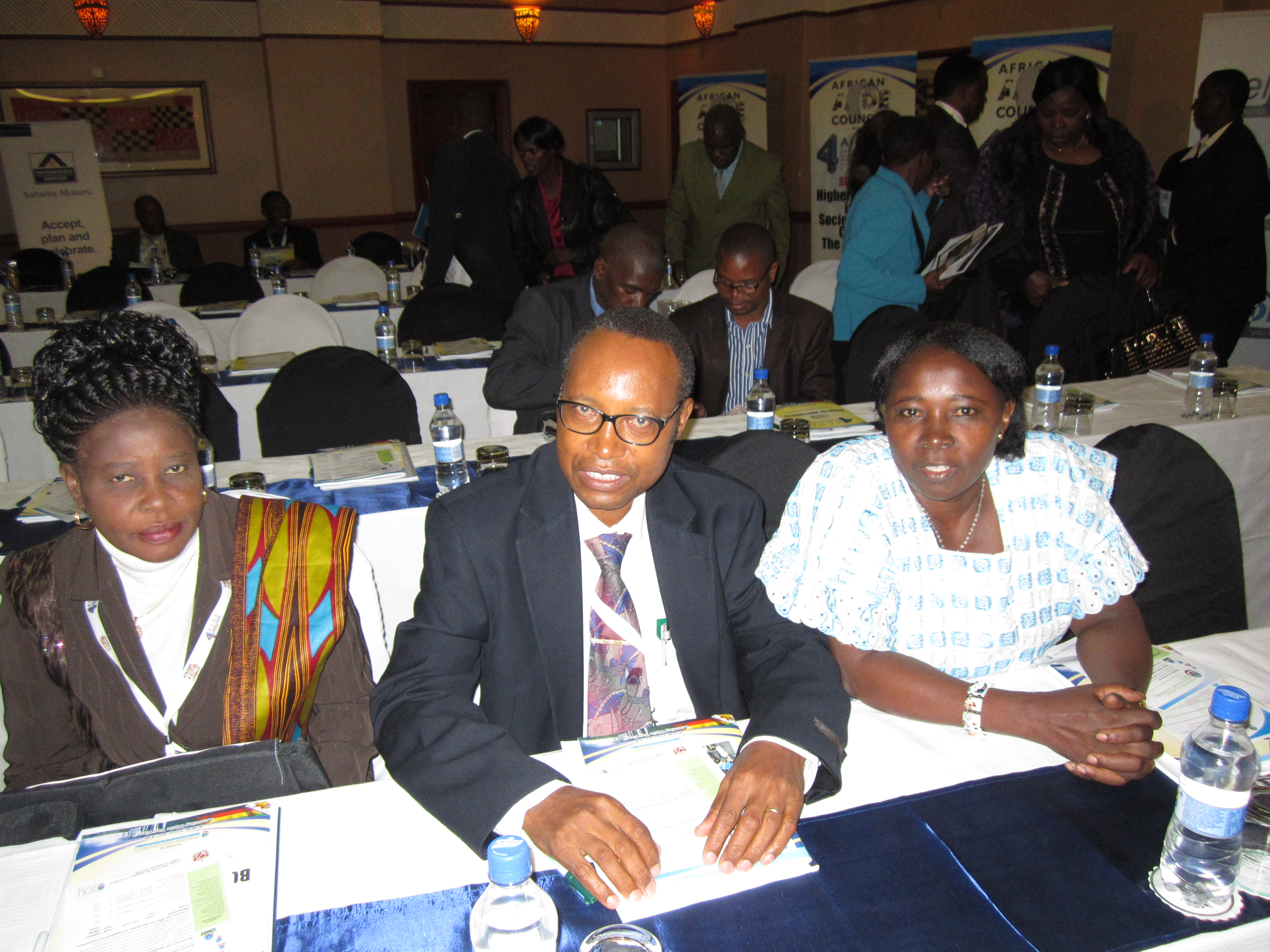 Kiswahili: Moja kati ya mikutano ya kimataifa Dkt. Irene aliyowahi kushiriki akiwa pamoja na Makamu Mkuu wa Chuo Kikuu Huria cha Tanzania Prof. Elifas Bisanda